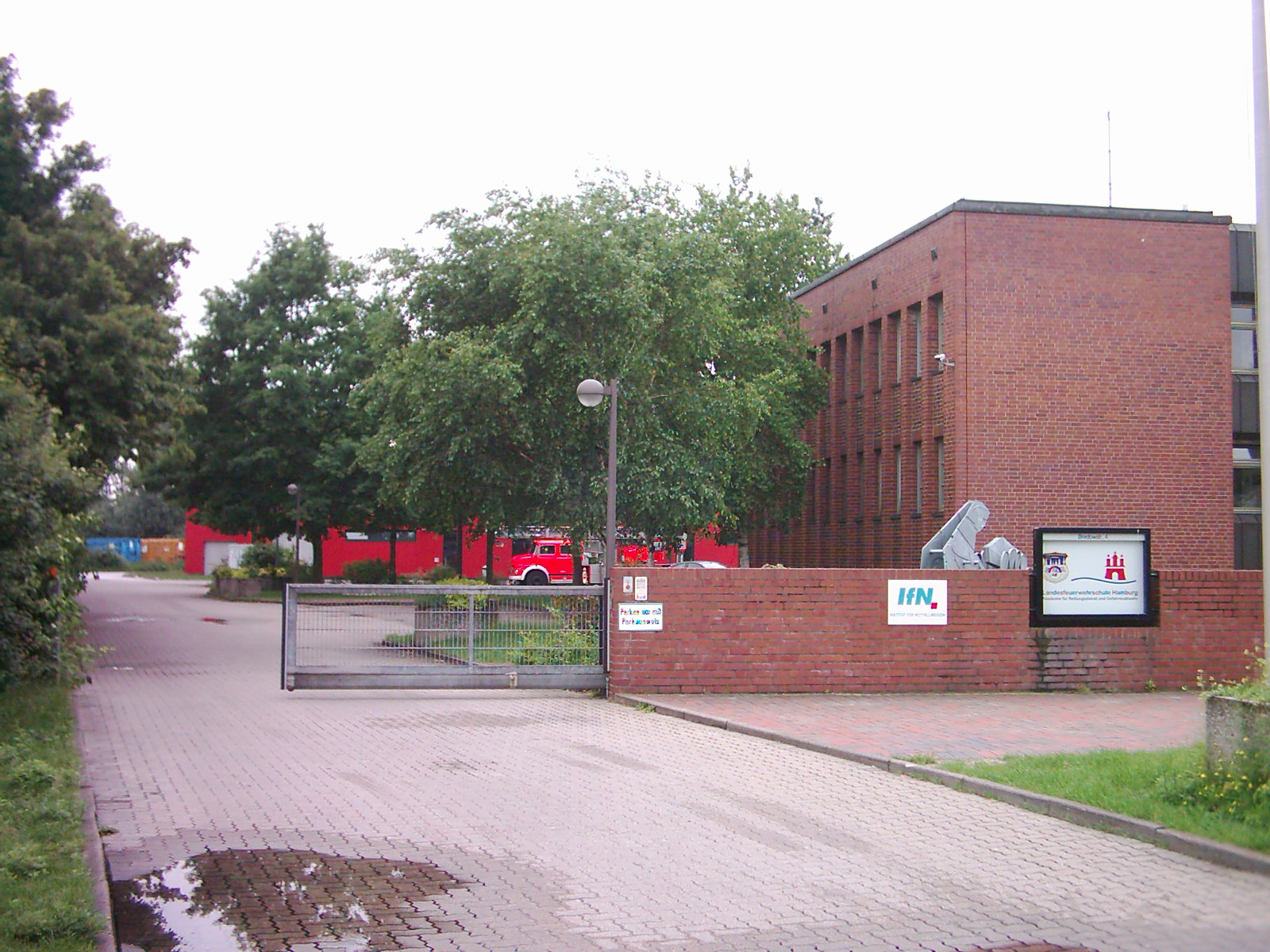 Die Feuerwehrakademie Hamburg in der Bredowstraße.